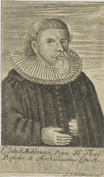 Johann Mühlmann 1573-1613 Prof. theol. & Archidiakon St. Nikolai Leipzig